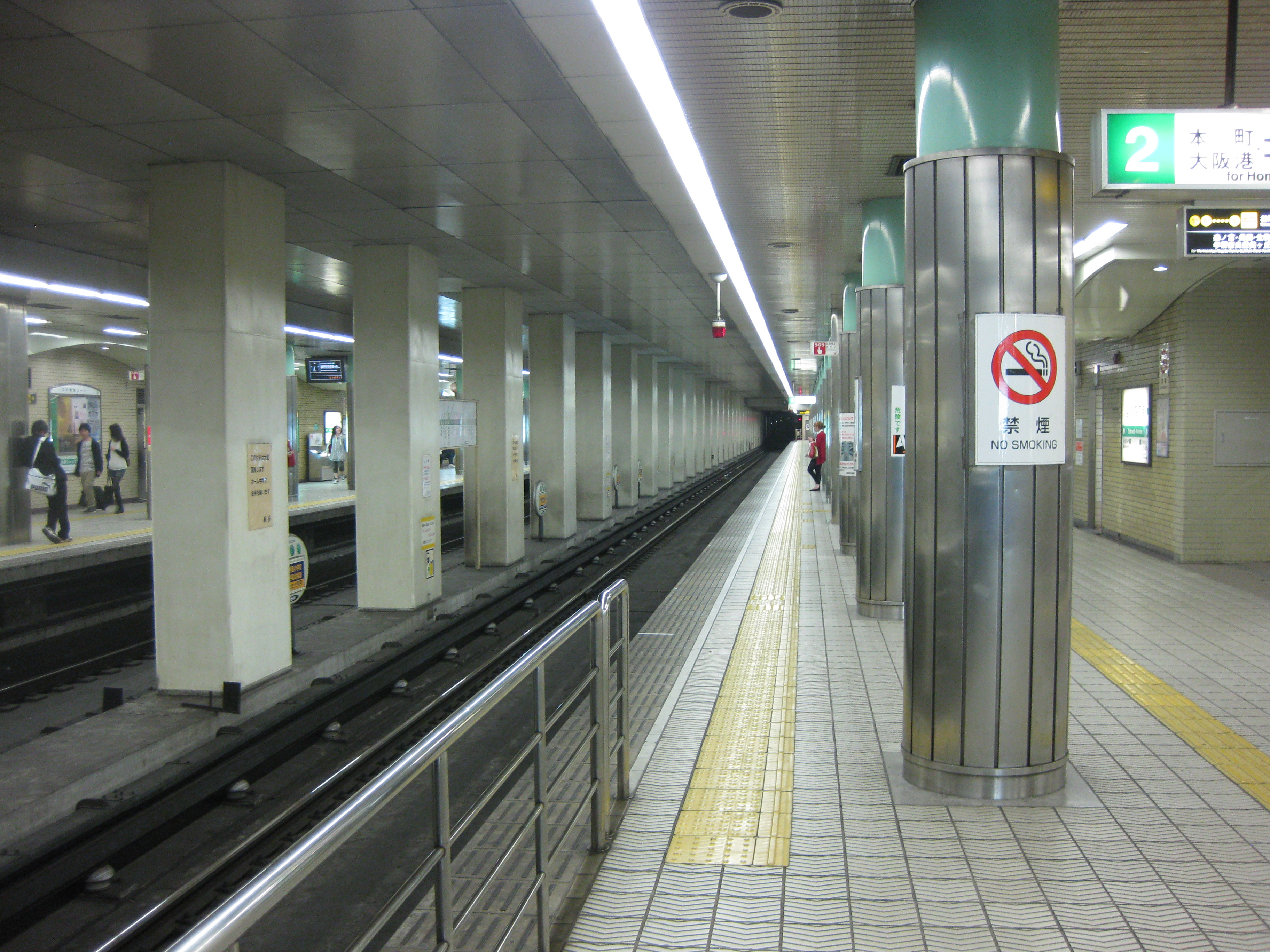 大阪市営地下鉄中央線谷町四丁目駅プラットホーム